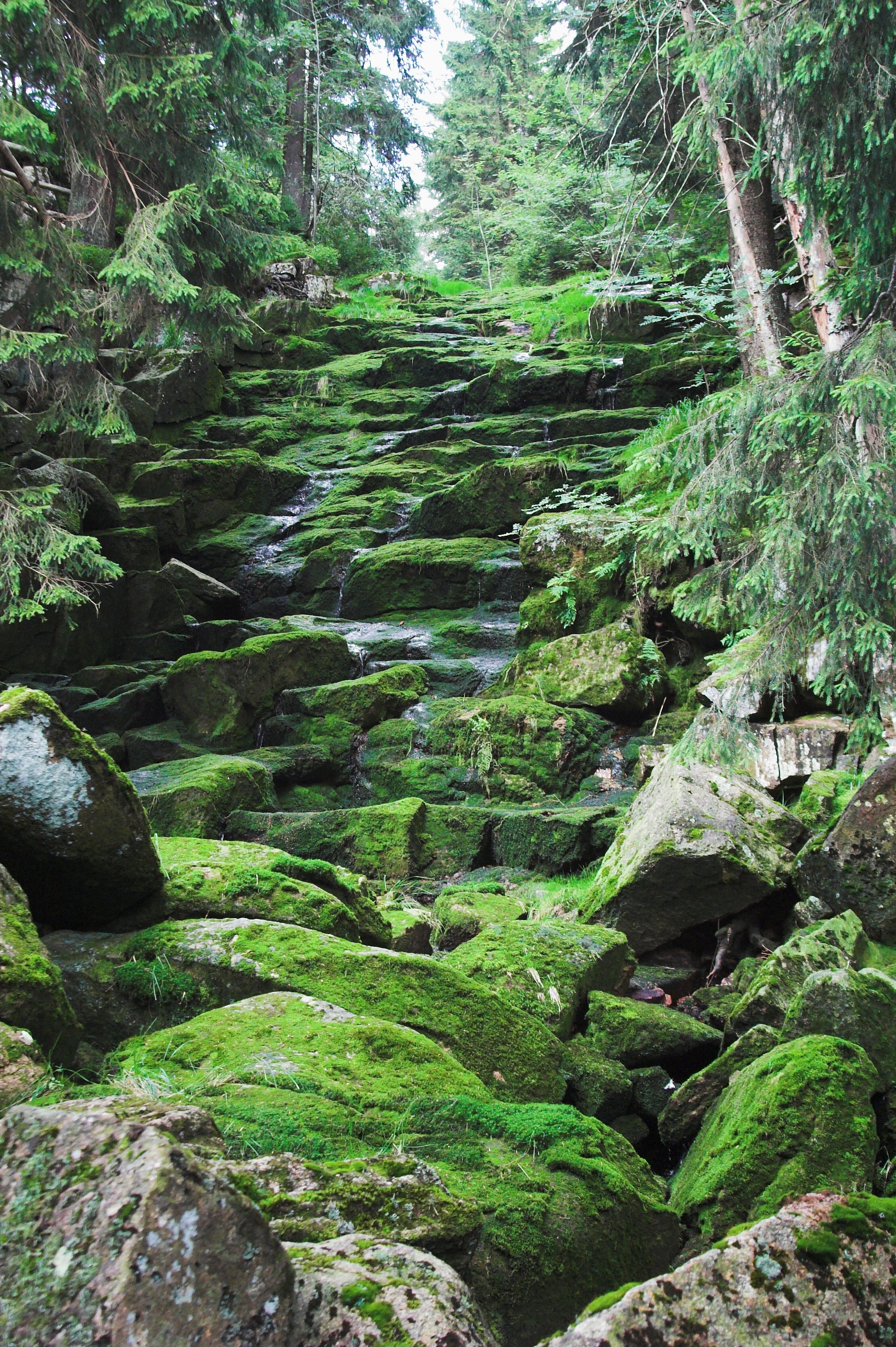 Die Große Ausflut des Oderteichs